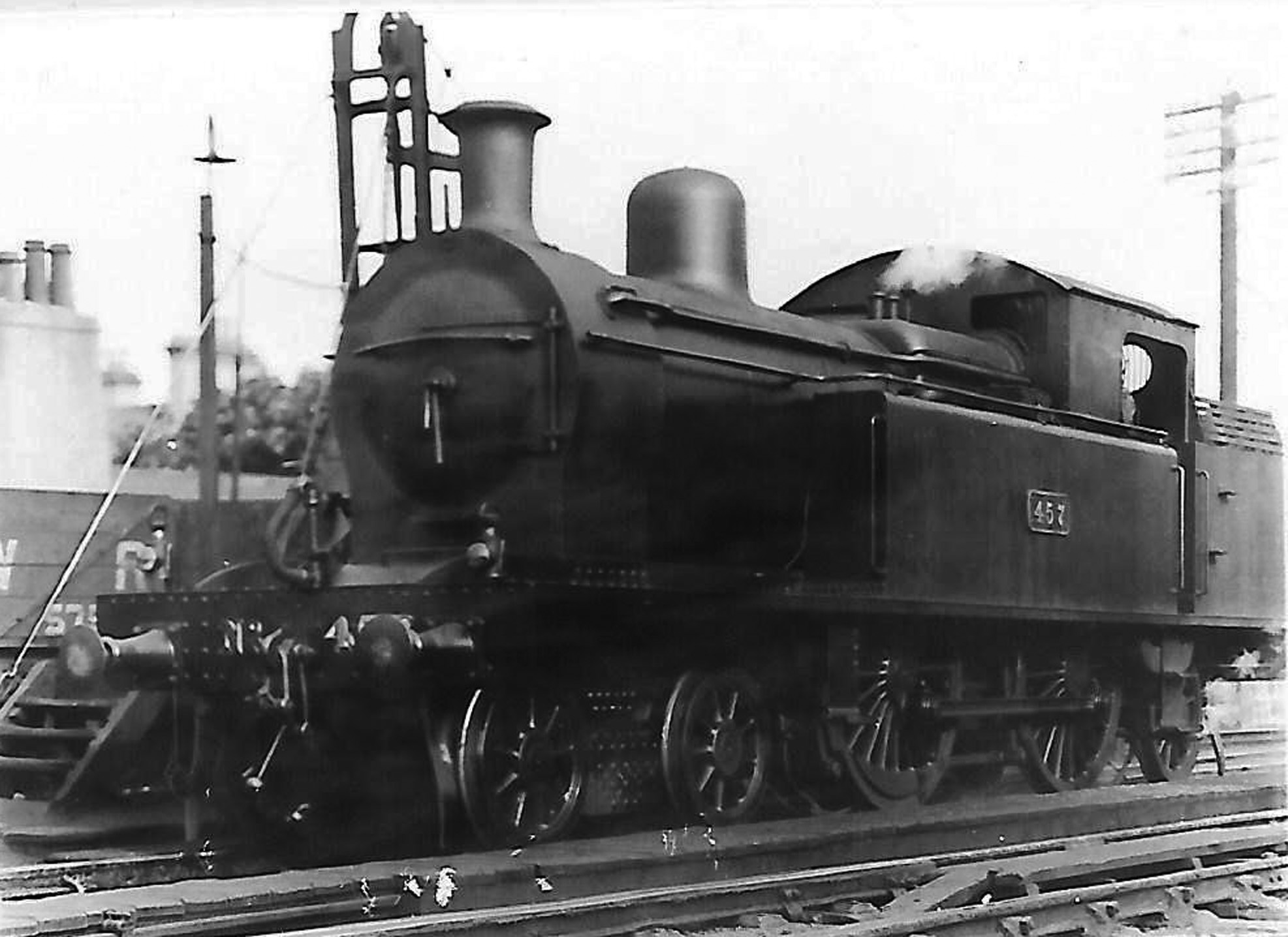 GSR no. 457 (ex-DSER no. 35) at Bray